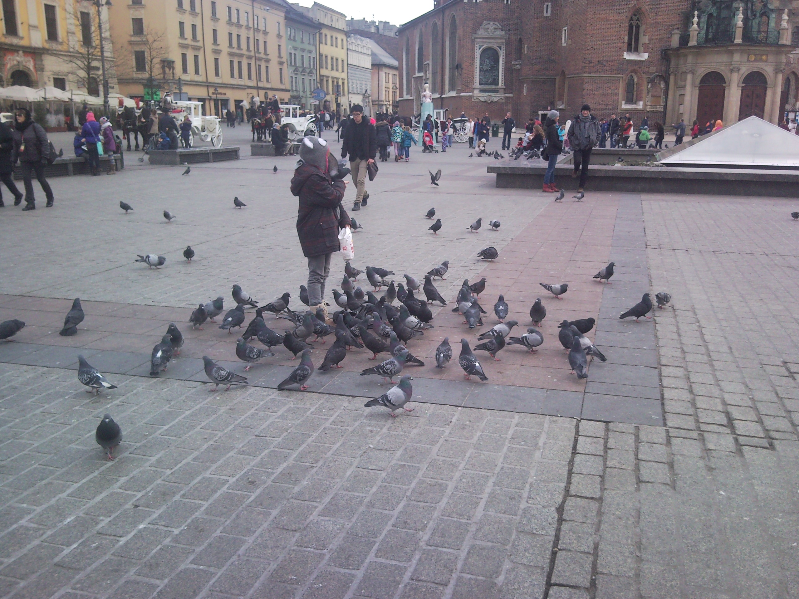 Krakowskie gołębie, rok 2015.